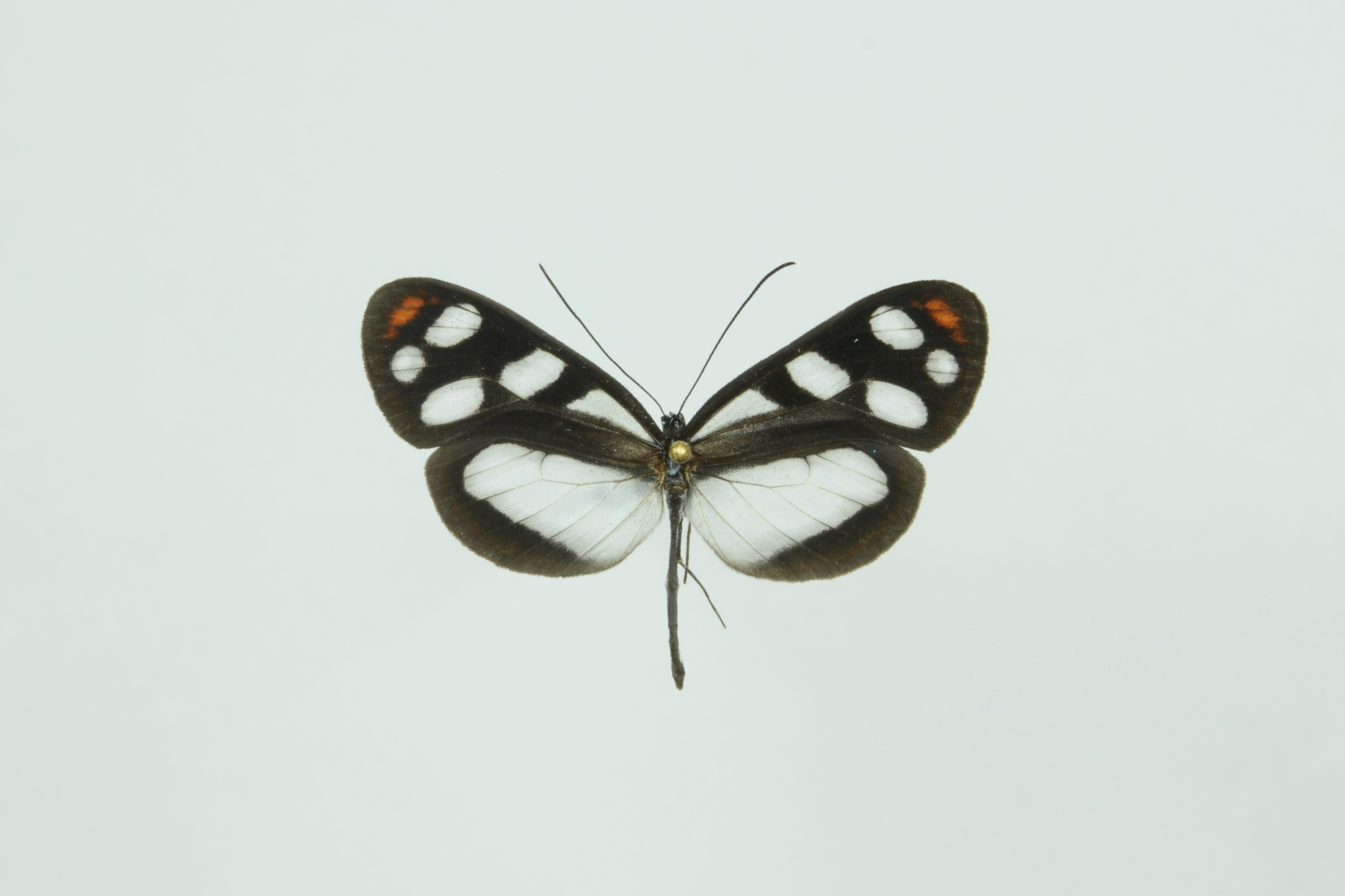 Oleria onega Orellana Prov., Ecuador